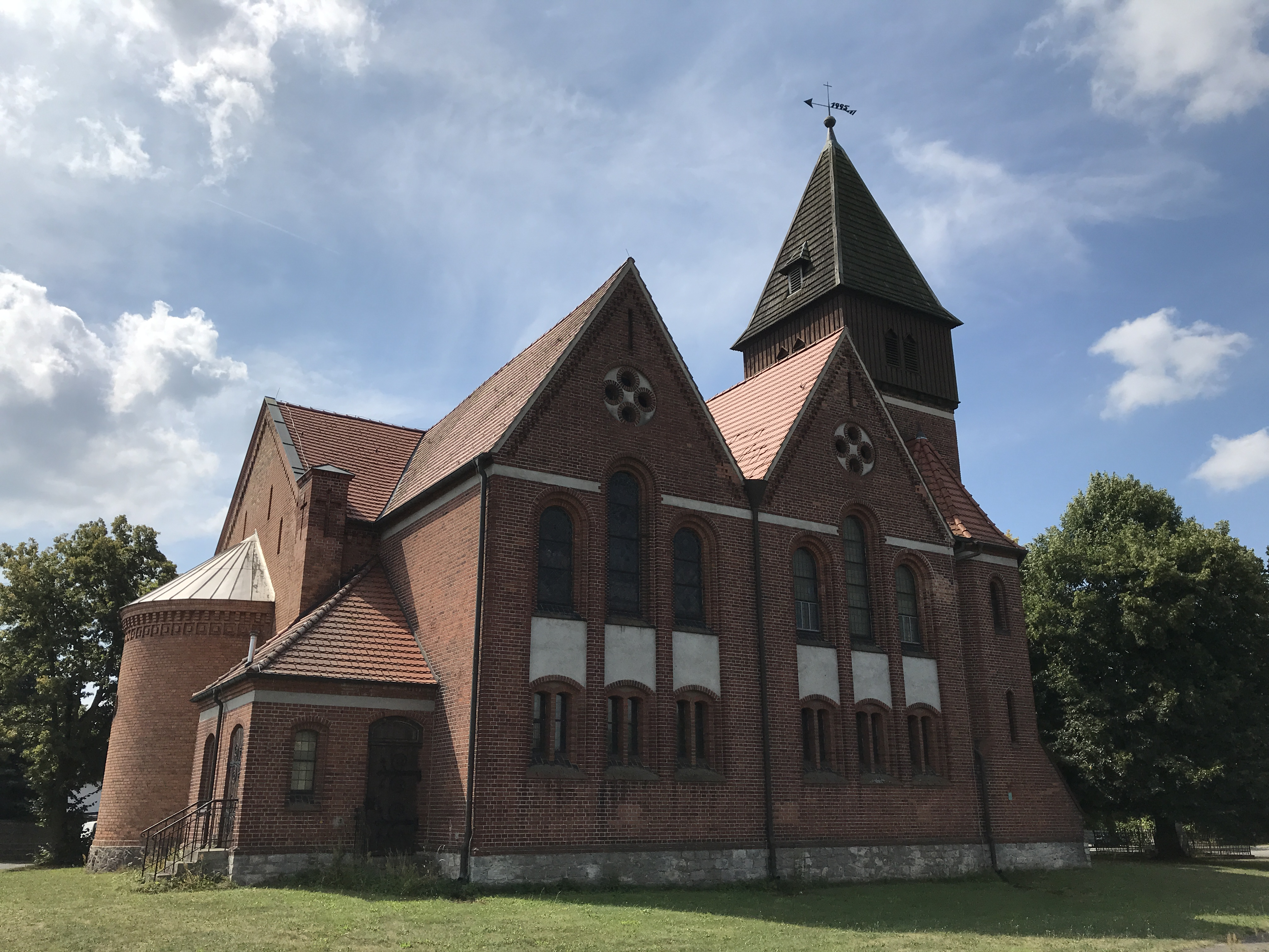 Die Dorfkirche Spreenhagen im Landkreis Oder-Spree im Land Brandenburg wurde 1855 aus gelbem Backstein im Rundbogenstil der Schinkelschule errichtet. Die Kirchenausstattung stammt aus dem Jahr 1902.